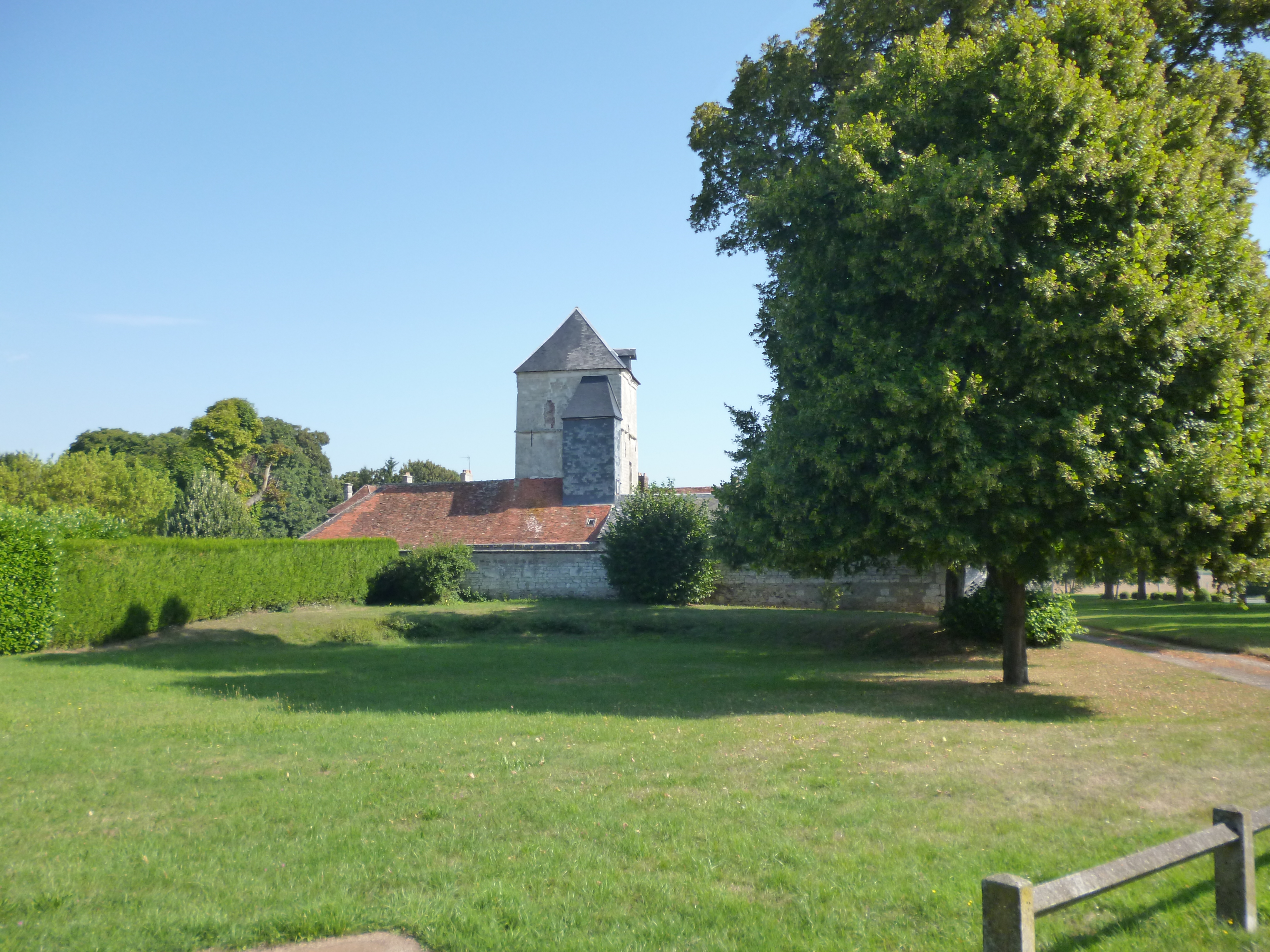 Ferme d'Eraine, située à Bailleul-le-Soc (Oise, Picardie). Inscription MH 1988. .